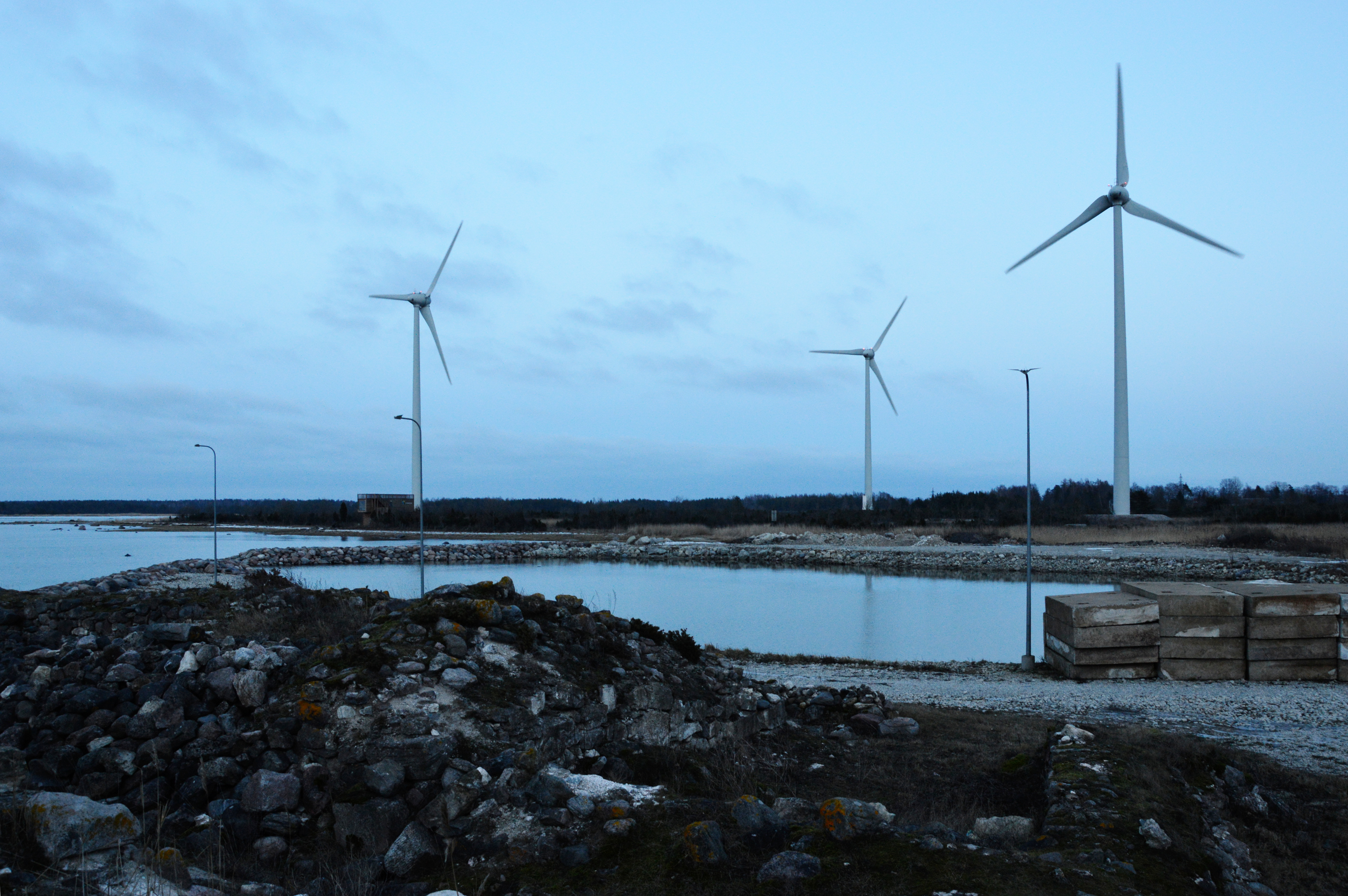 Virtsu kalasadam.